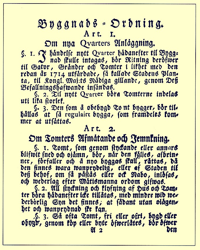 "Byggnads - Ordning För Westerås Stad"